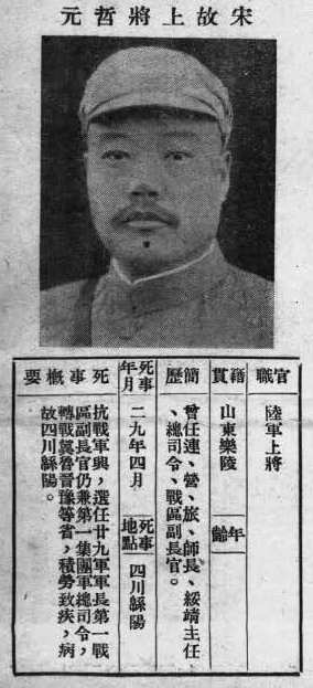 中文（台灣）: 抗戰軍人忠烈錄第一輯中的烈士遺像